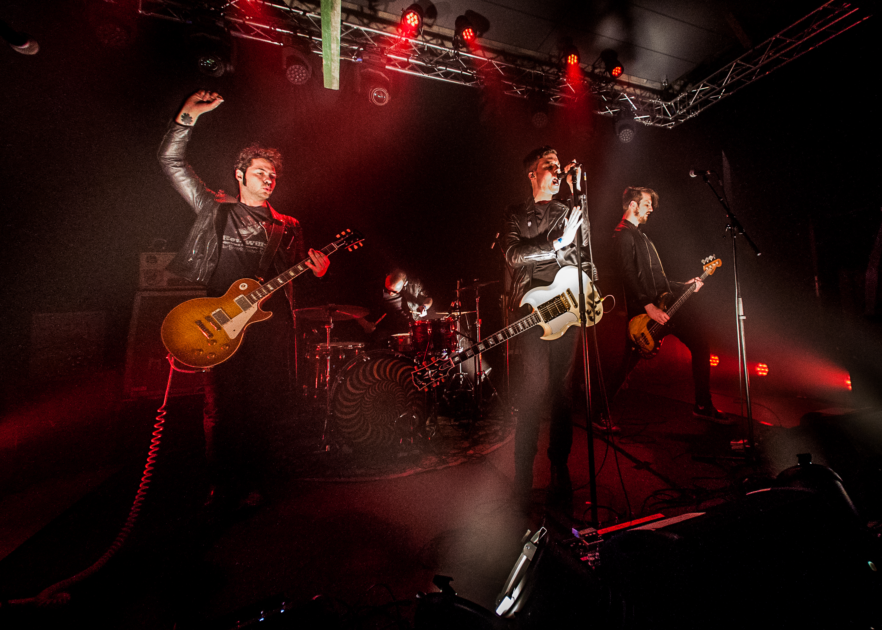 The Sore Losers